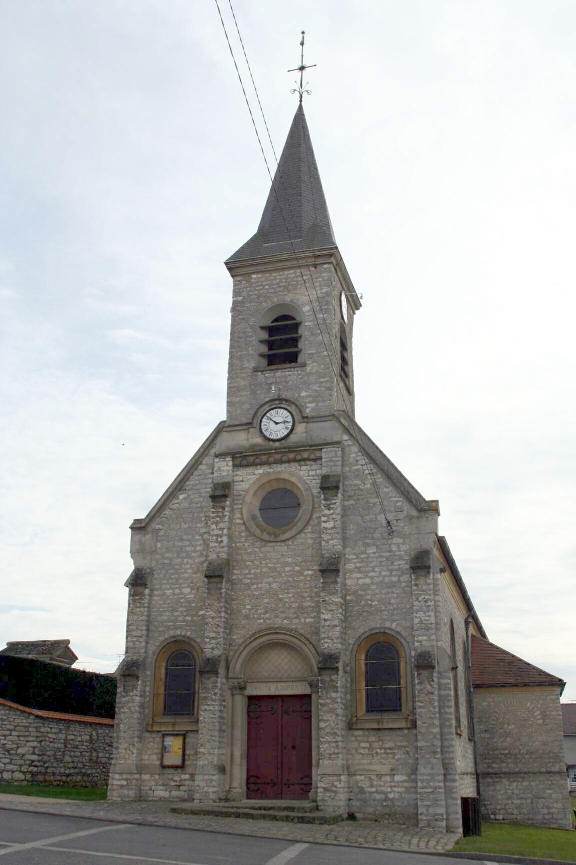 Église de Breuil-Bois-Robert - Yvelines (France)